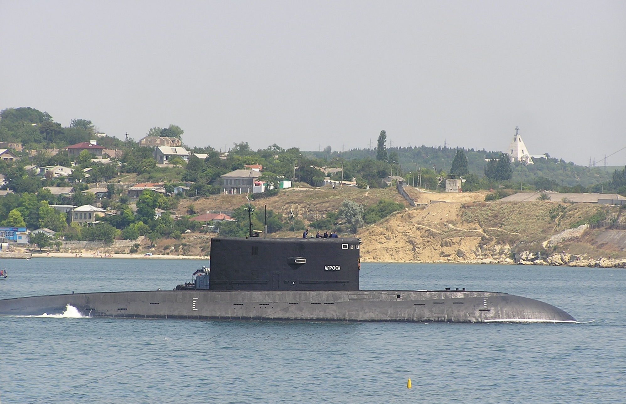 Подводная лодка Б-871 «Алроса» в Севастополе.